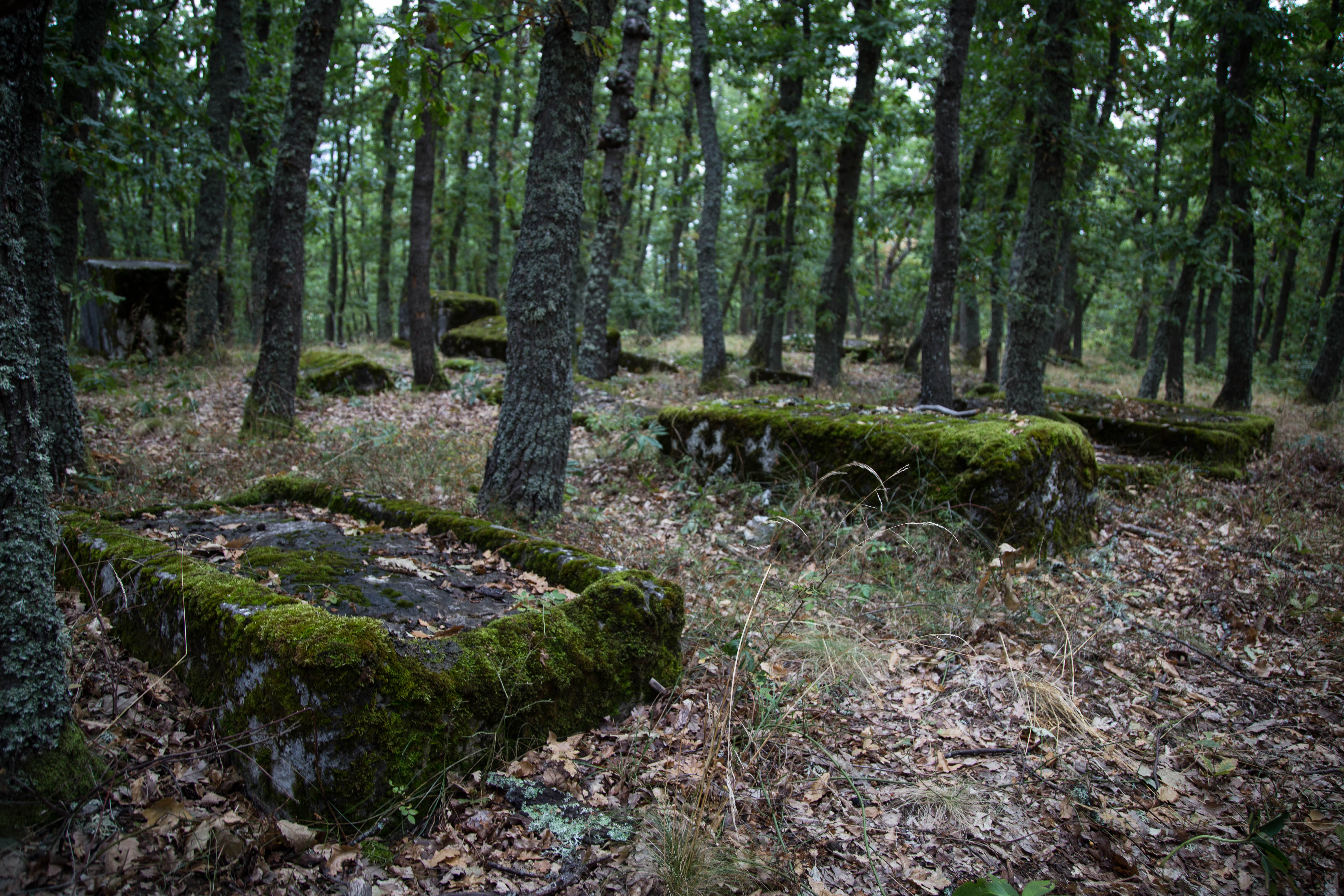 Stećci, detalj